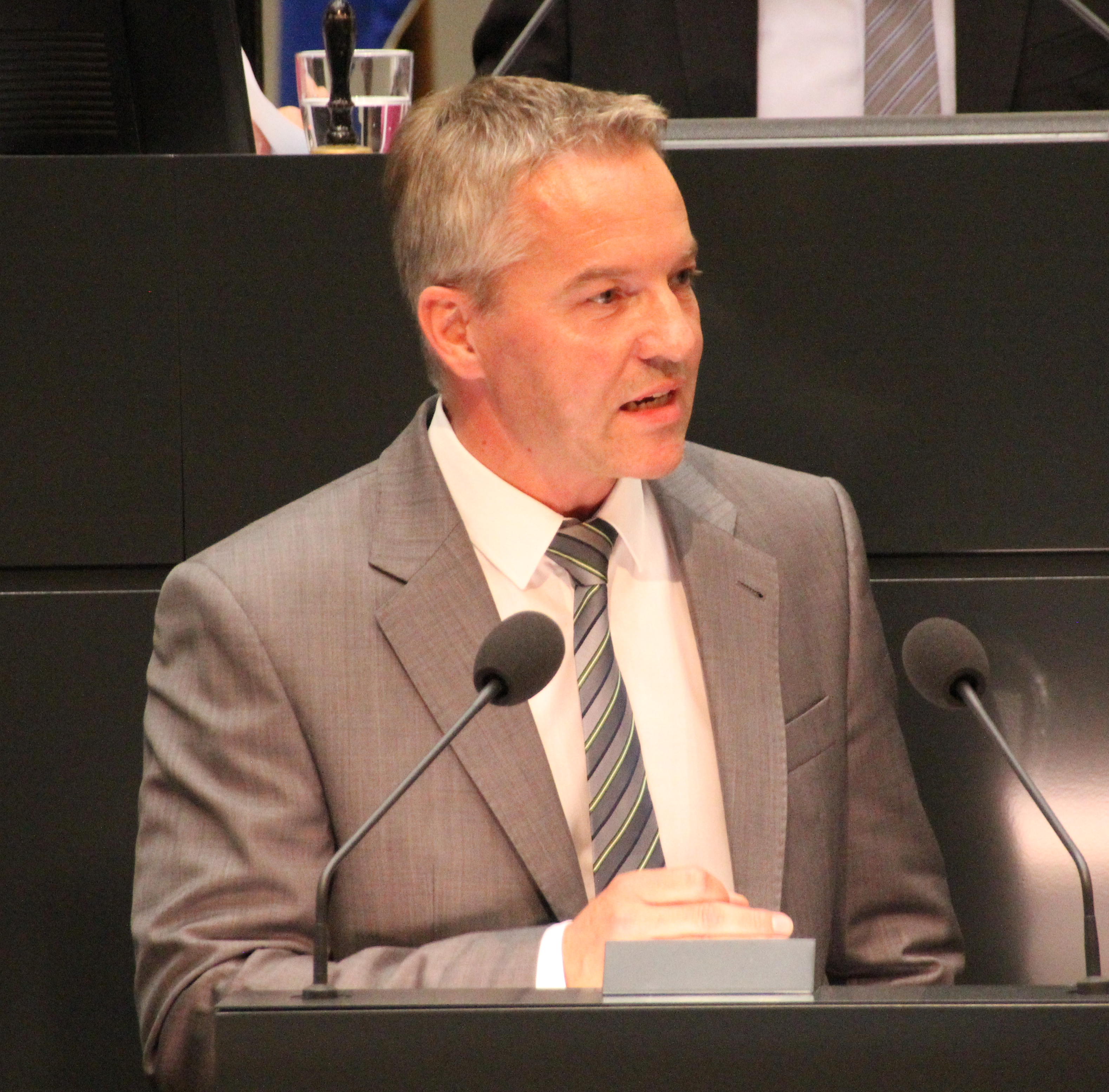 Marco Genthe während einer Plenardebatte im Niedersächsischen Landtag.